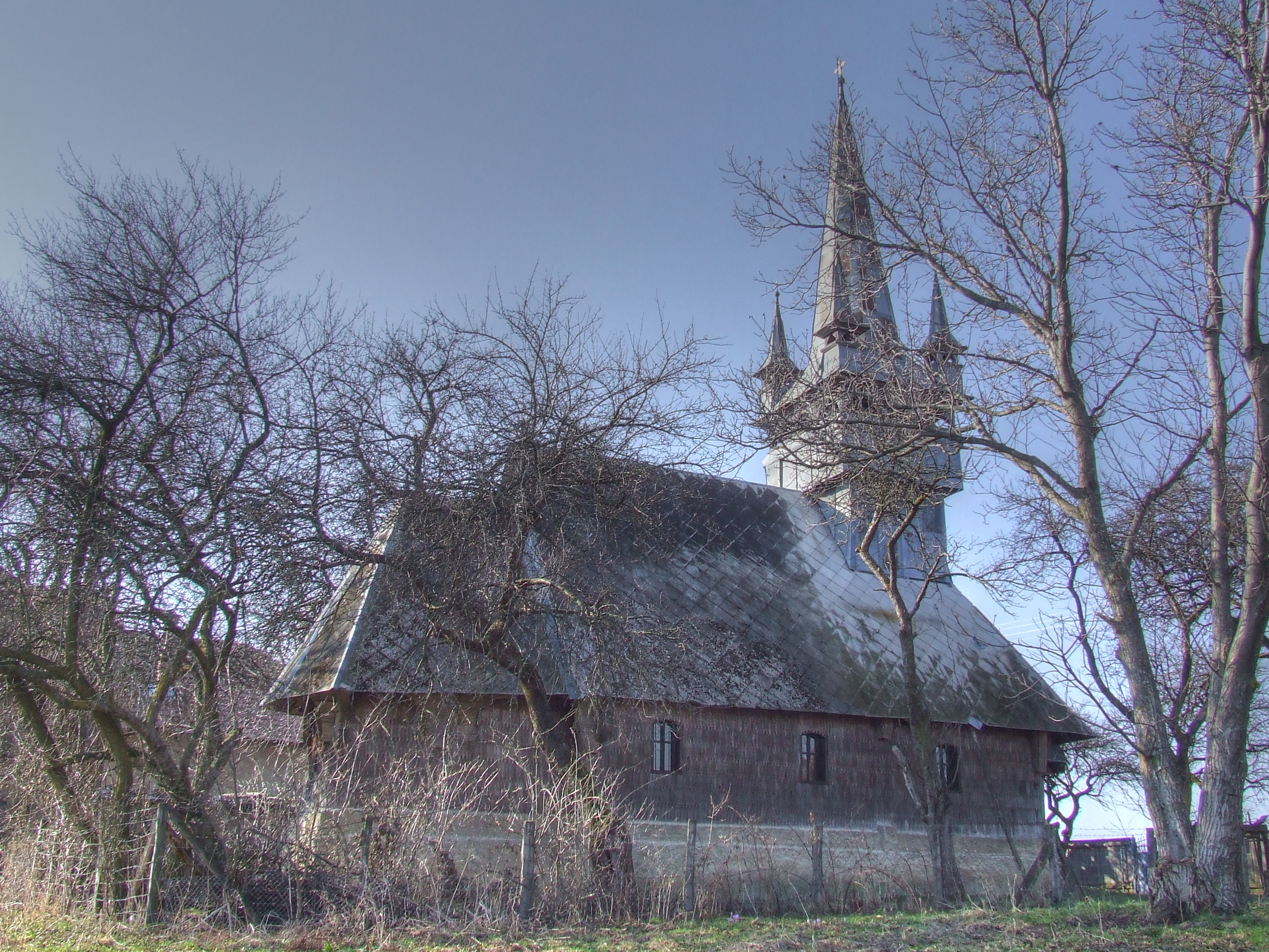 Biserica de lemn din Bălcești, județul Cluj. Vedere laterală.